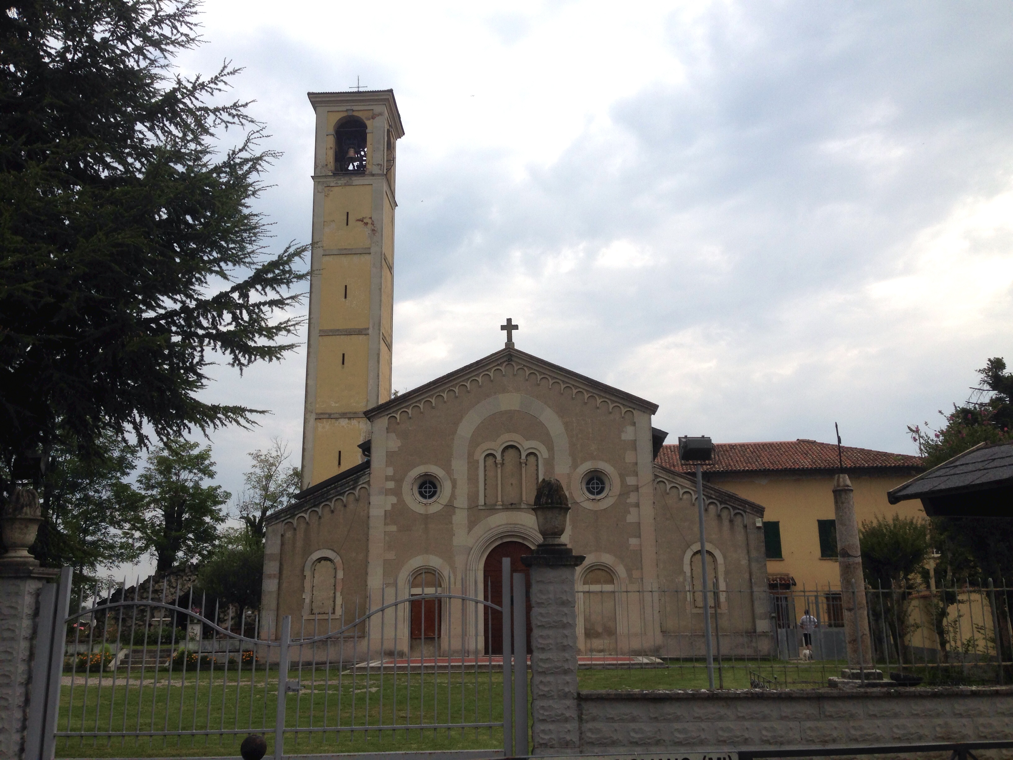 Chiesa di Santa Maria dell'Assunta a Bestazzo